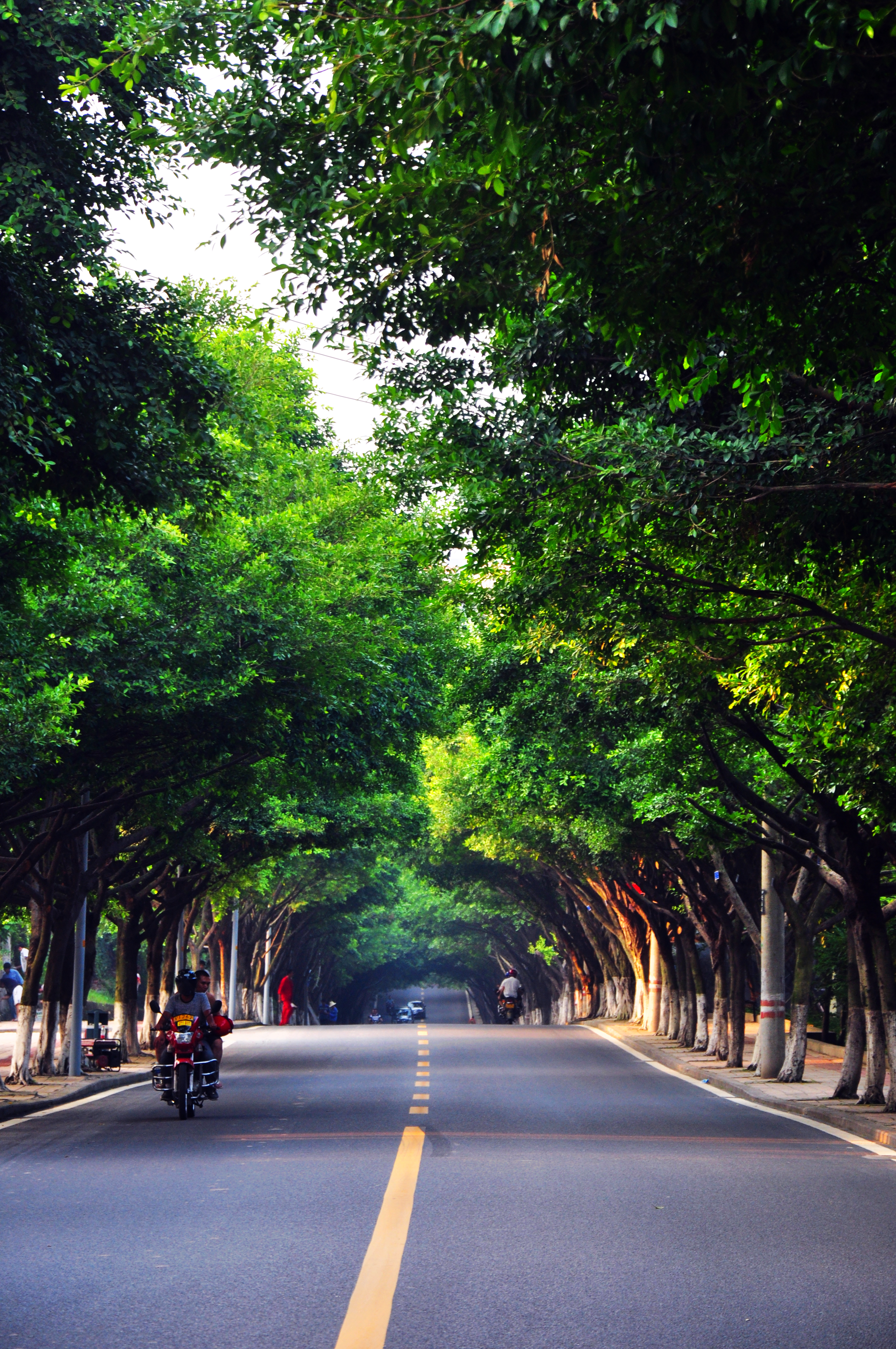 重庆渝北湖滨西路